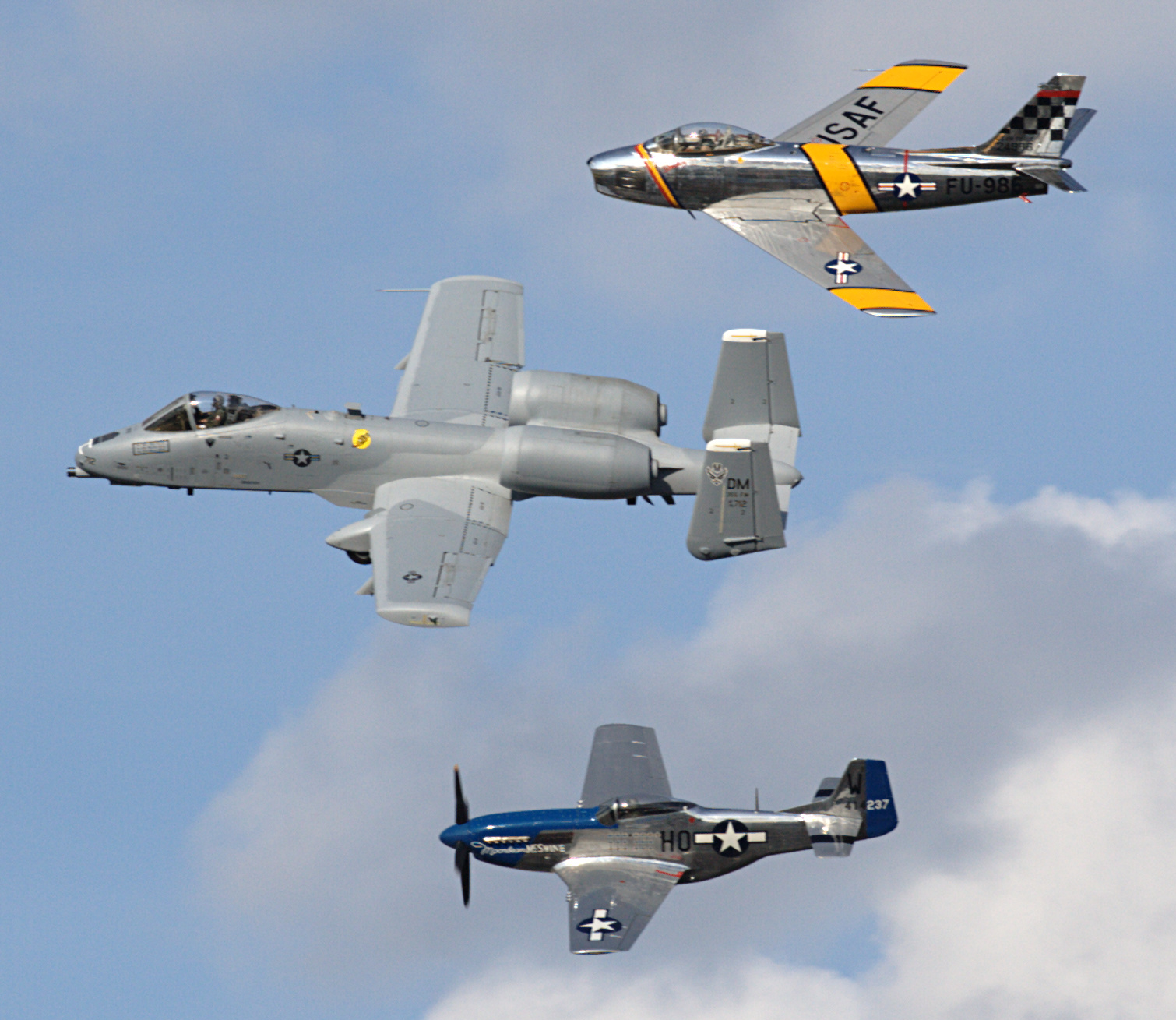 Heritage